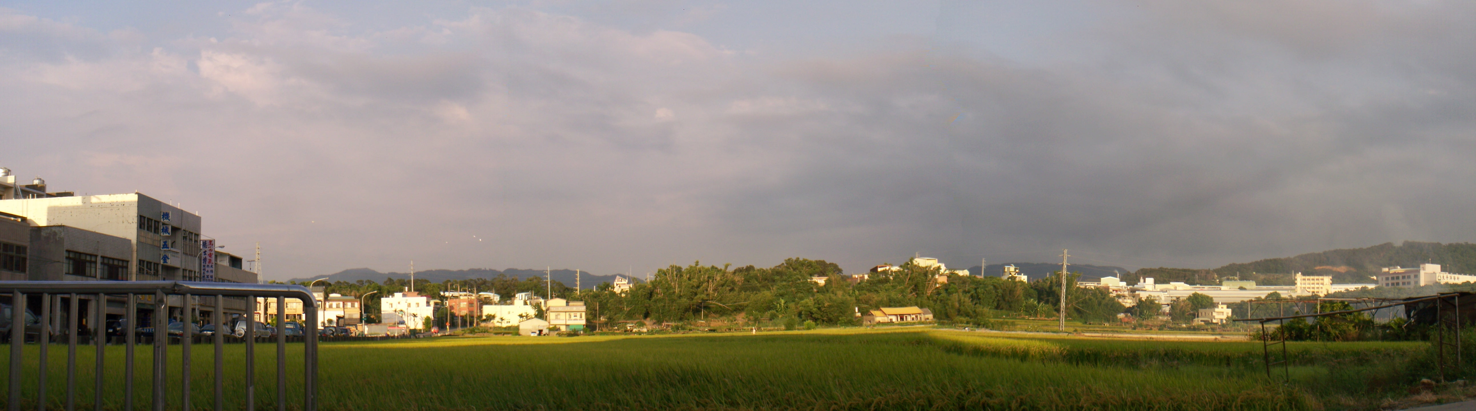 苗栗縣銅鑼鄉稻田景致。攝於銅鑼鄉立圖書館旁。